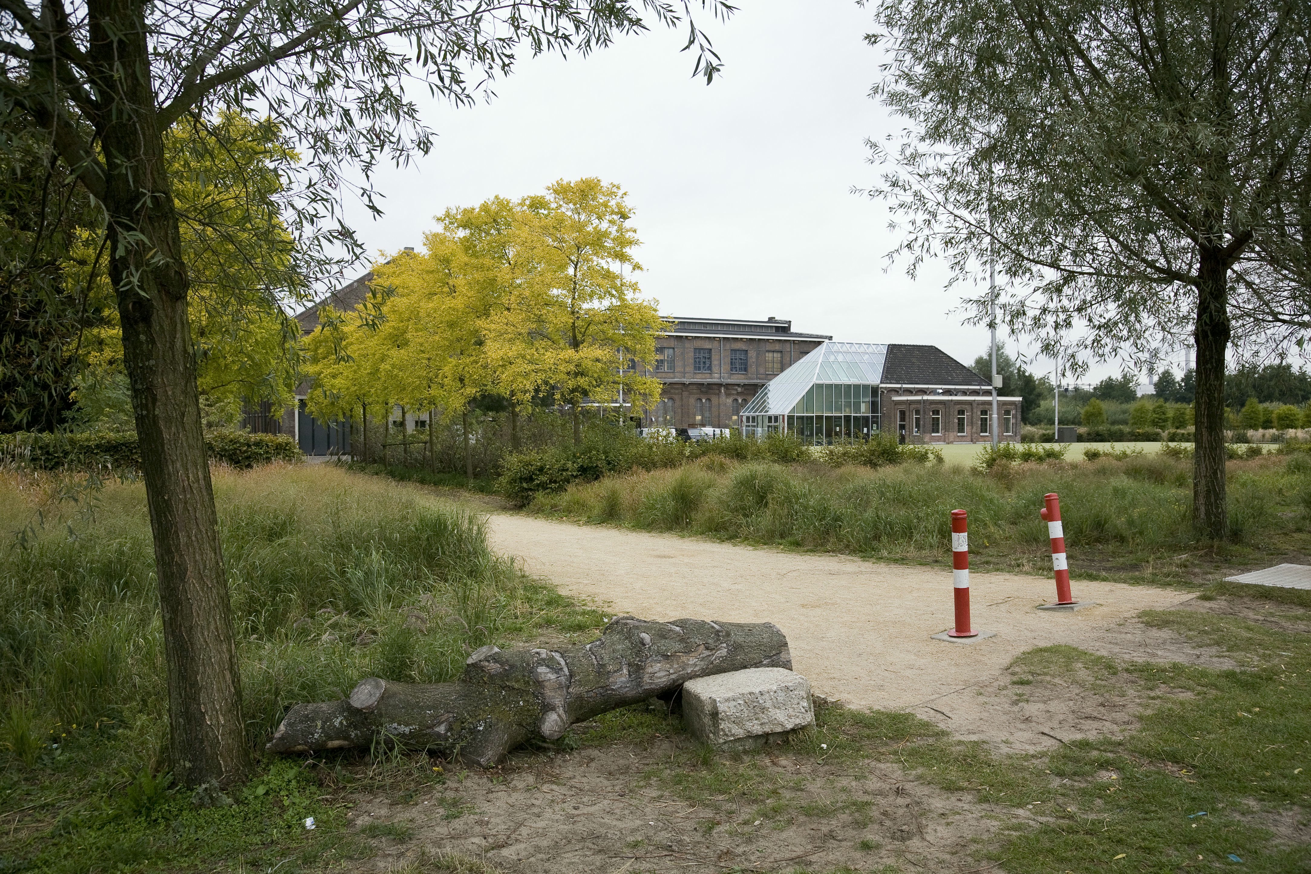 Complex Westergasfabriek - v.m. Westergasfabriek: Overzicht Westergasfabriek bij de sportvelden met omgeving (opmerking: Gefotografeerd t.b.v. publicatie "Tussen Haarlemmerpoort en Halfweg" (auteurs: Jaap Evert Abrahamse - Menne Kosias en Erik Schmitz))